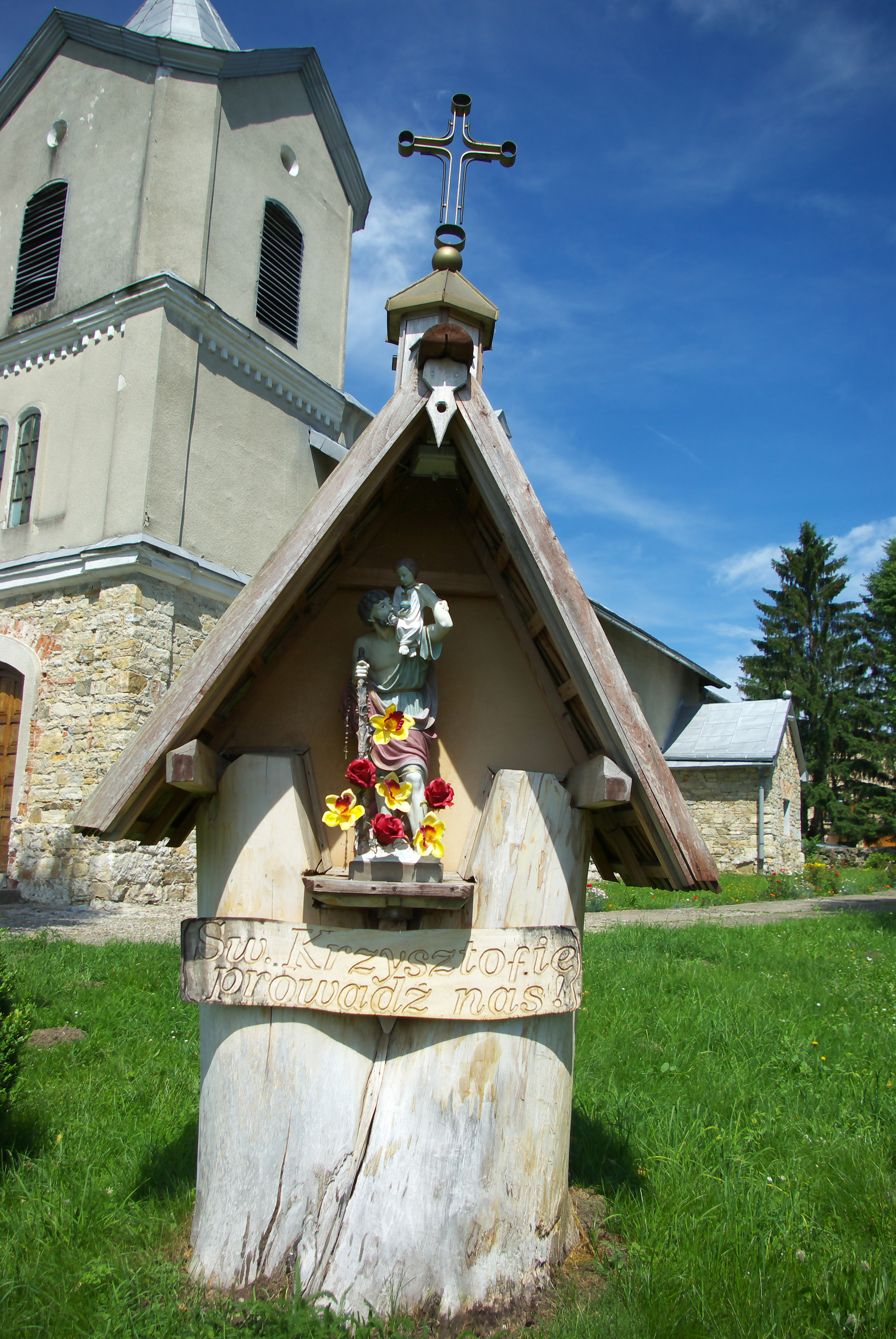 Drewniana kapliczka św. Krzysztofa - Zespół dawnej cerkwi greckokatolickiej. p.w. Zaśnięcia NMP w Trepczy: dawna cerkiew greckokatolicka p.w. Zaśnięcia NMP